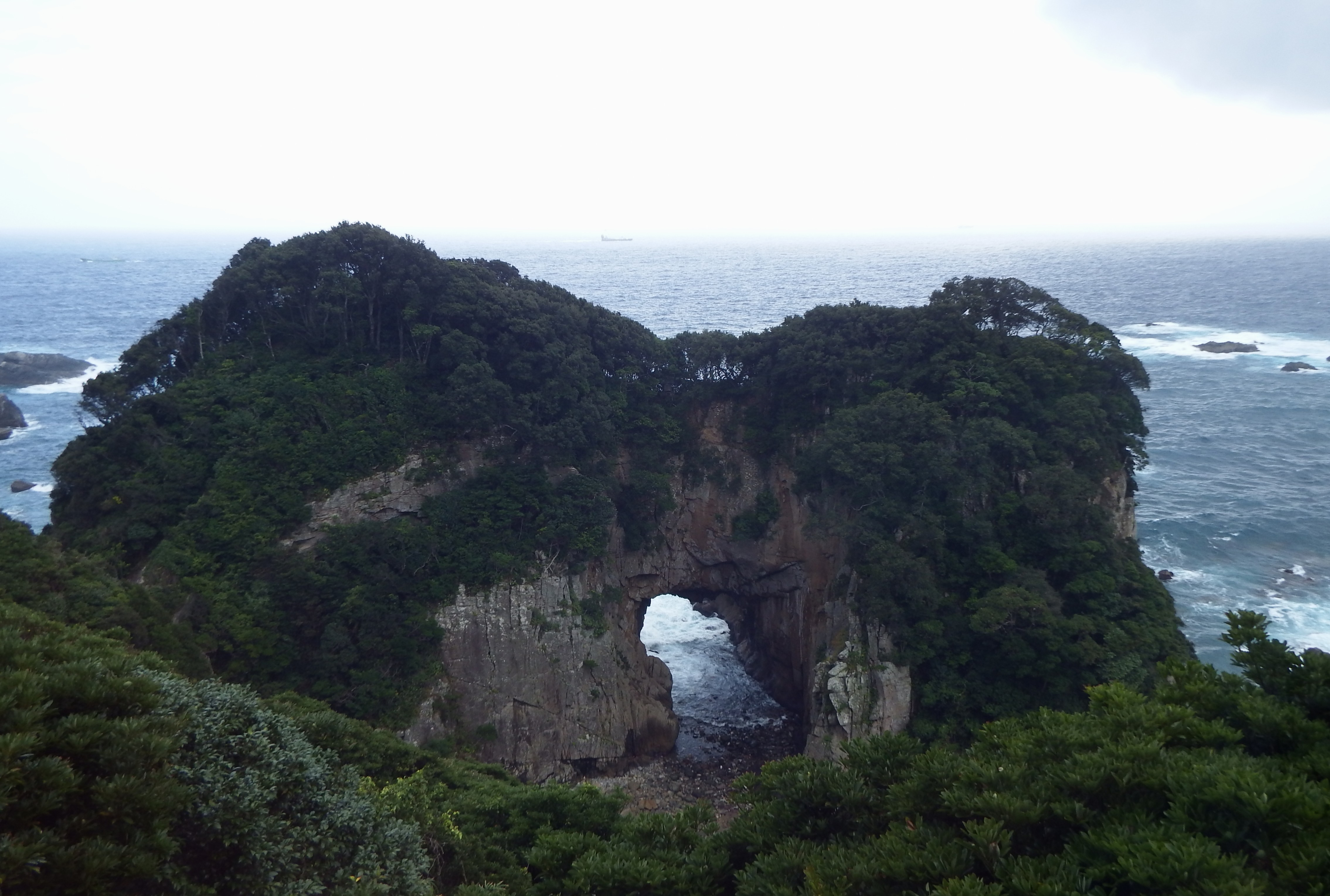 白山洞門をジョン万足湯から